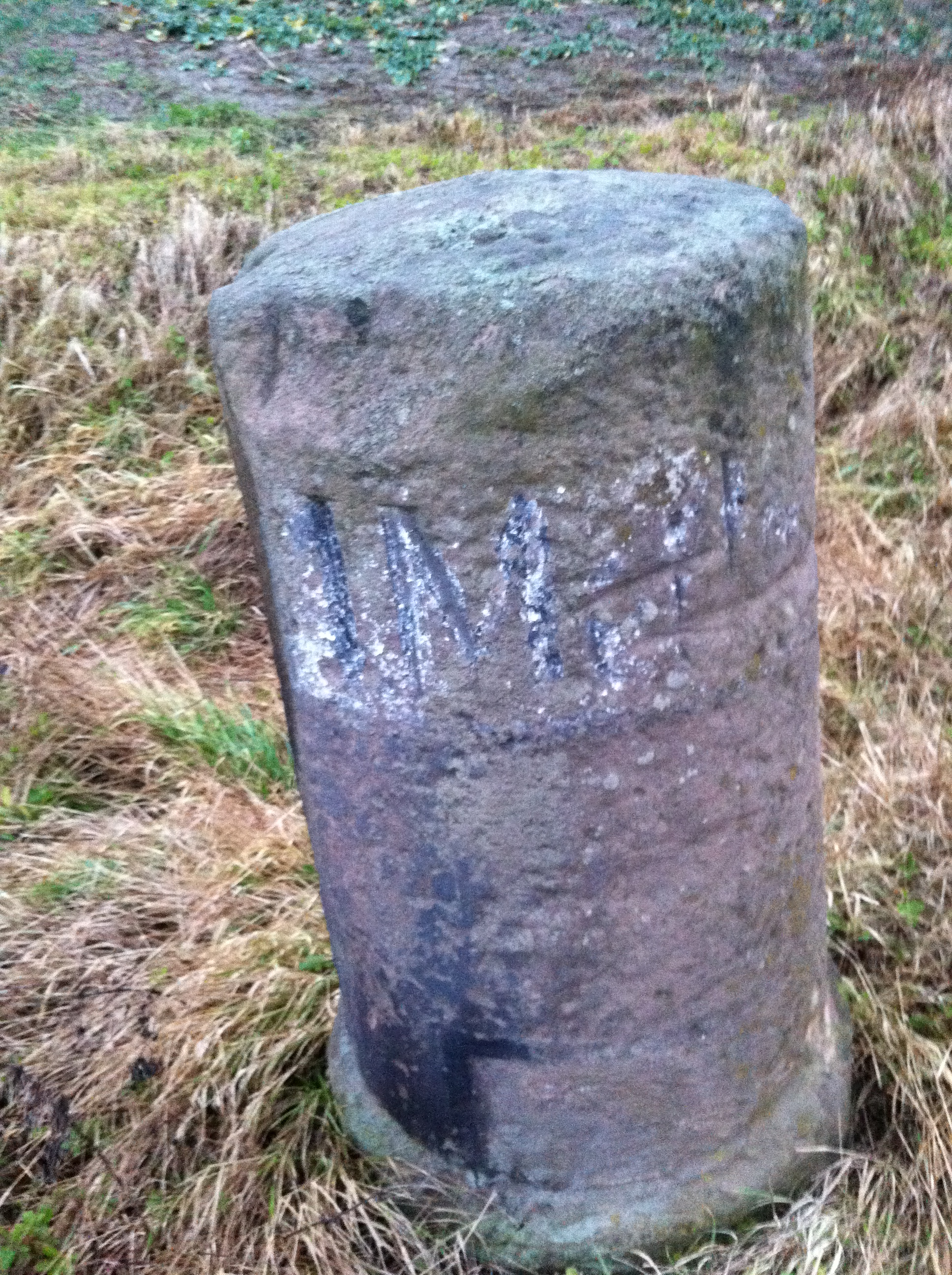 Preußischer Rundsockelmeilenstein an der alten Straße von Halle nach Magdeburg (heute L 145) in der Nähe von Frößnitz.